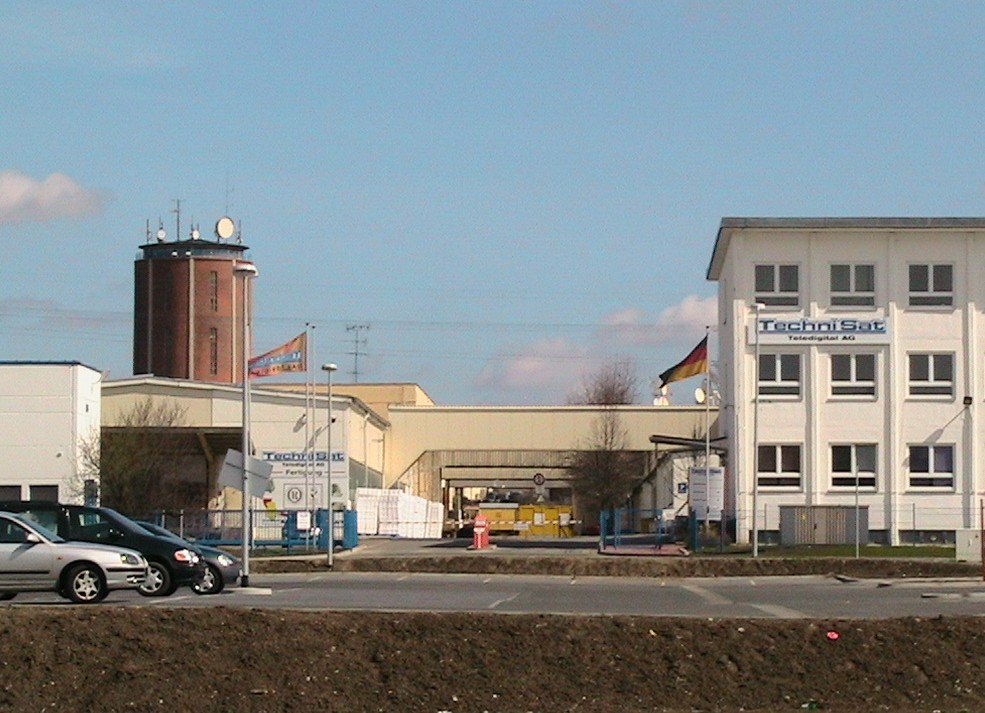 TechniSat-Niederlassung in Staßfurt Sonstiges: Canon MVX250i (Fotofunktion) - Ausschnitt